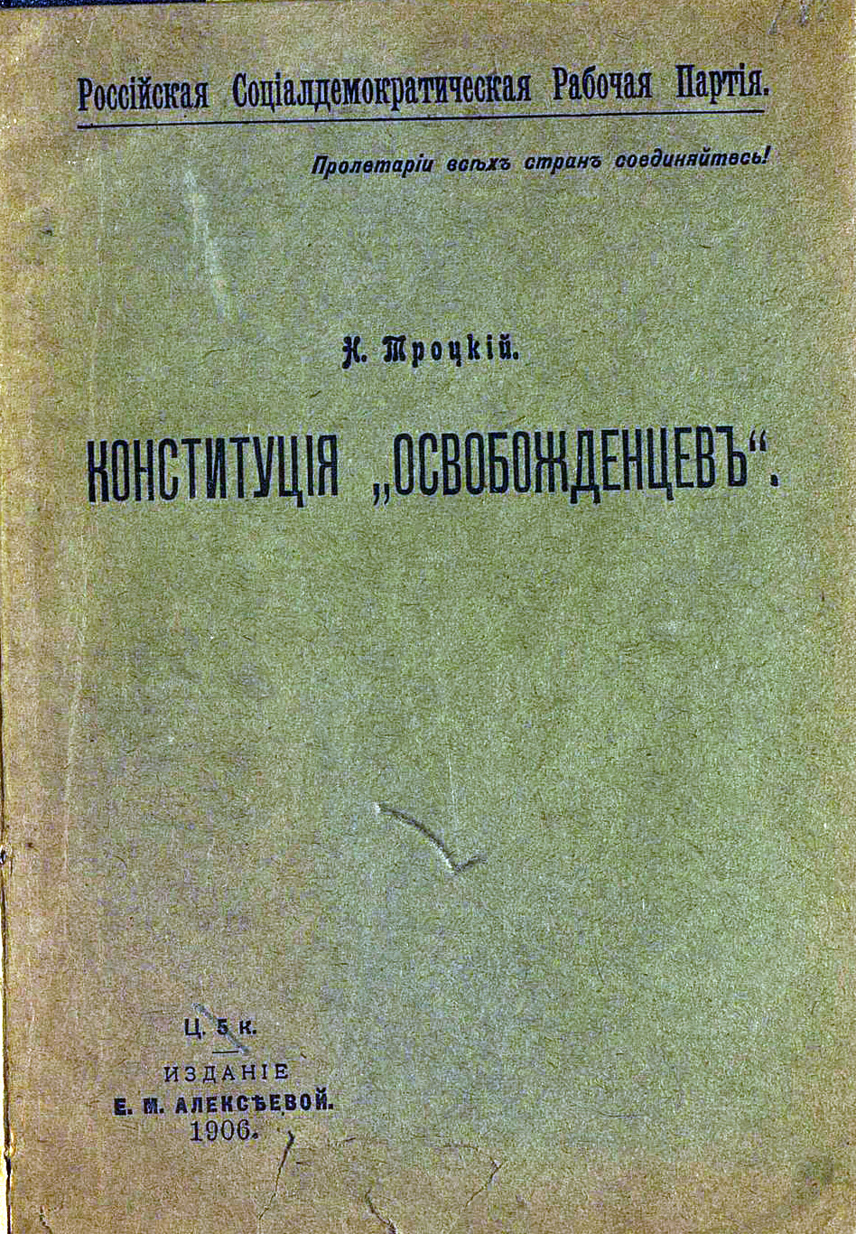 Троцкий Н. Конституция «Освобожденцев». — СПб.: Тип. товарищества «Общественная польза», РСДРП, 1906. — 19 с.